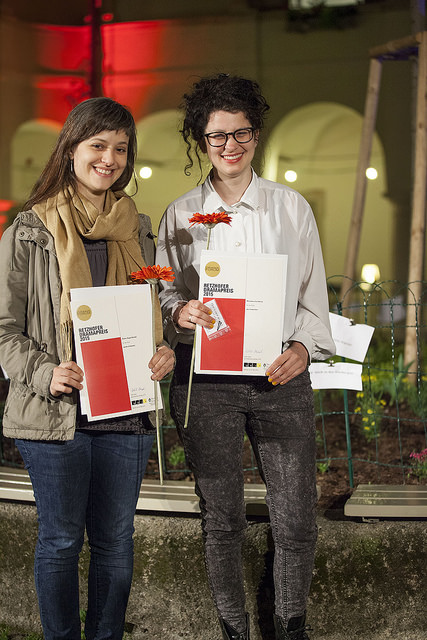 Özlem Özgül Dündar und Miroslava Svolikova / Gewinnerinnen des Retzhofer Dramapreis 2015